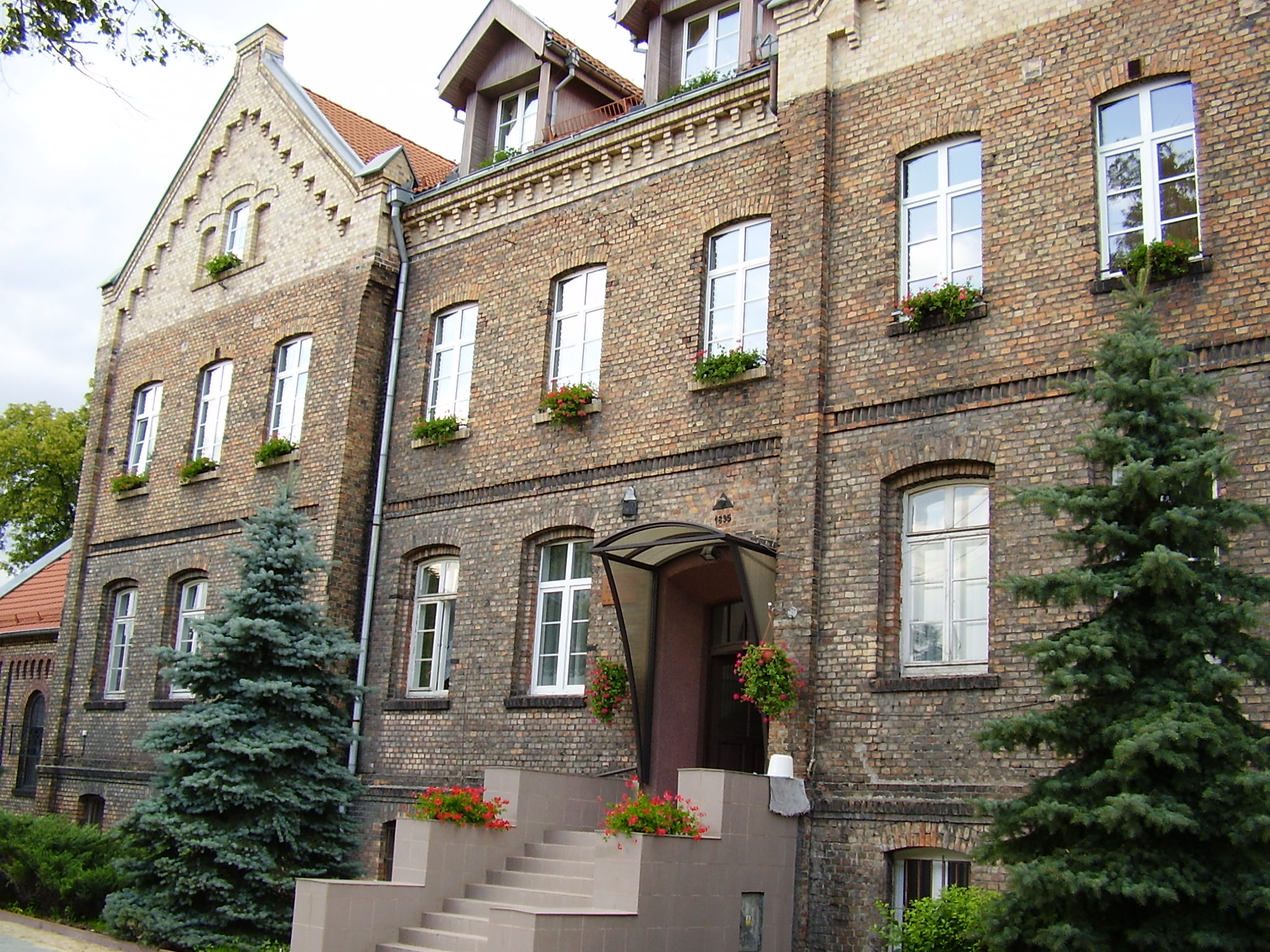 Klasztor Piątkowska